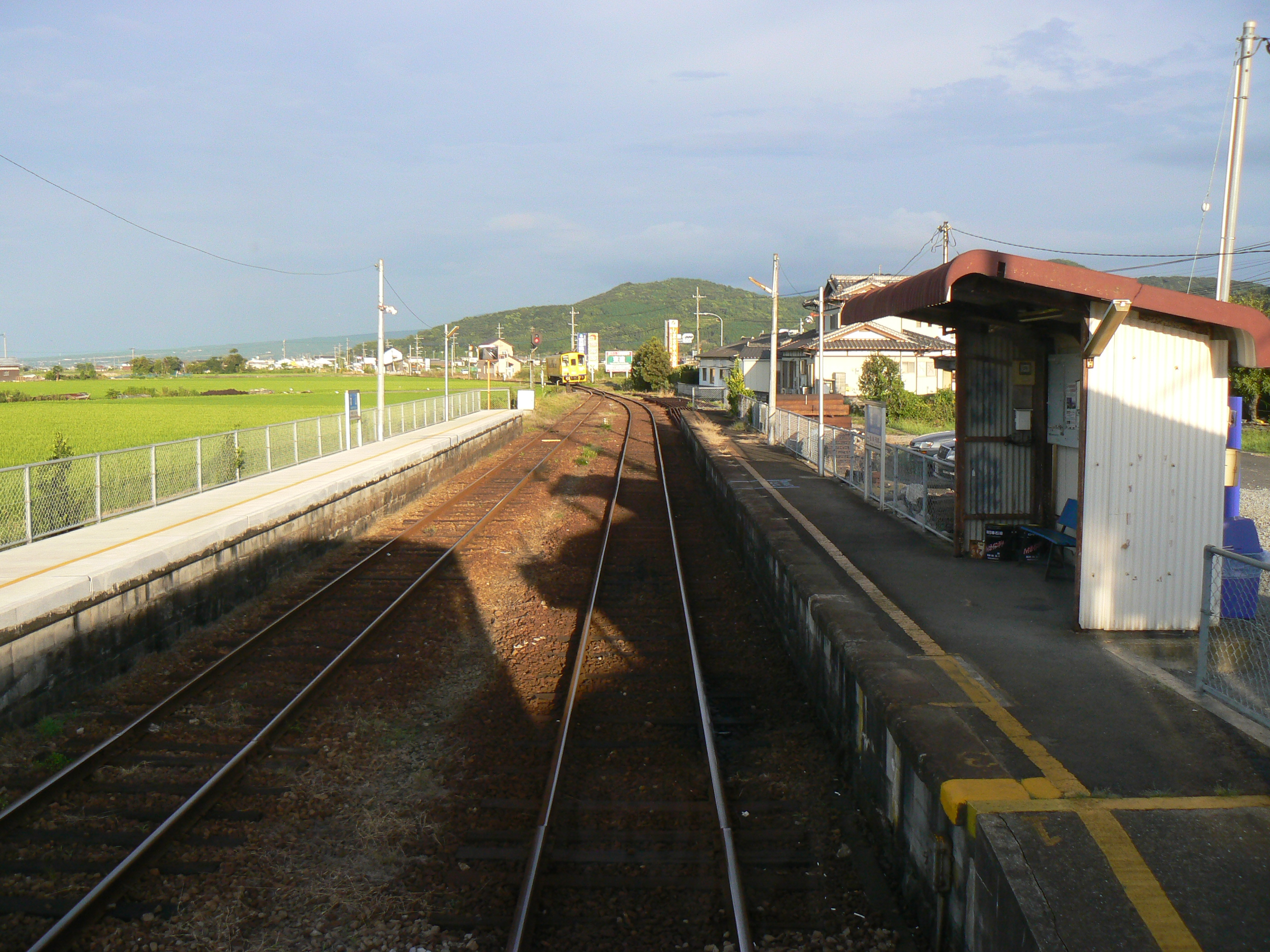 島原鉄道森山駅